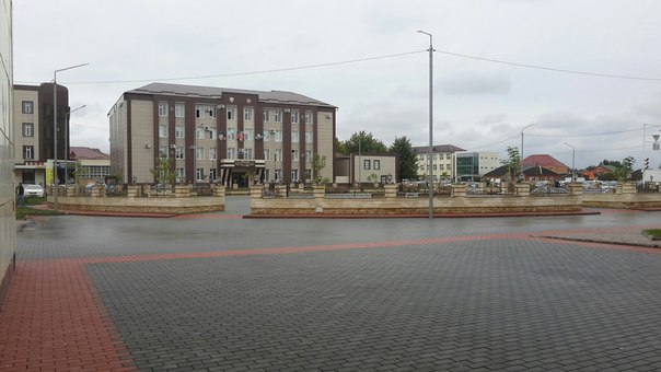 Город Урус-Мартан